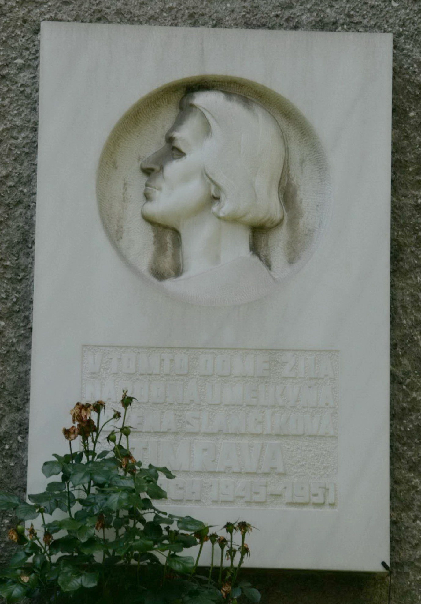 Losonc - Božena Slančíková-Timrava emléktáblája